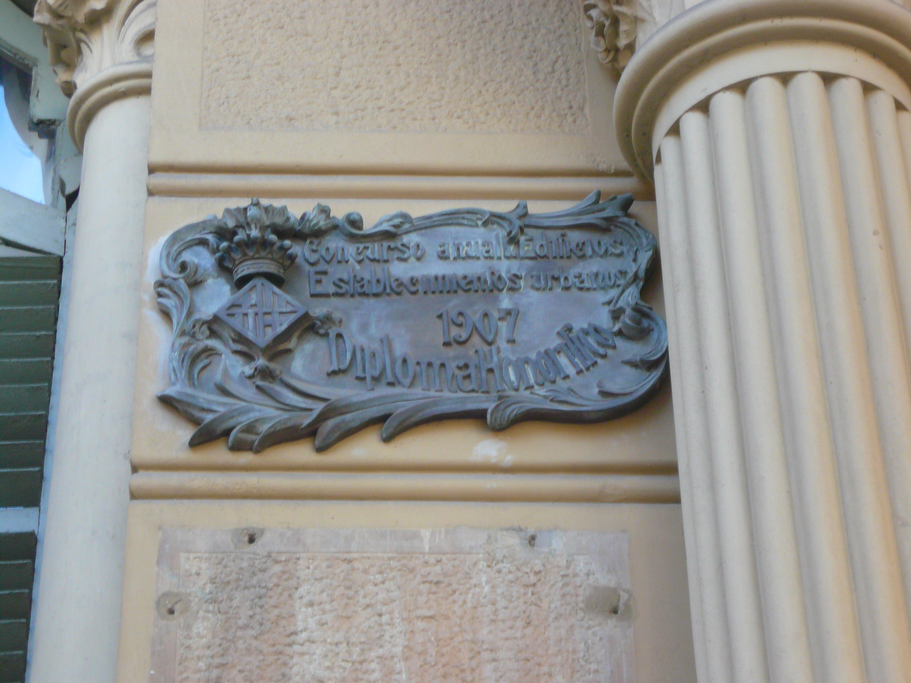 Casa Enrique Llorenç (Barcelona)